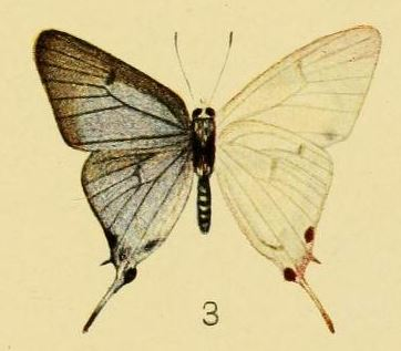 Iolaus alienus bicaudatus as "Jolaus bicaudatus"